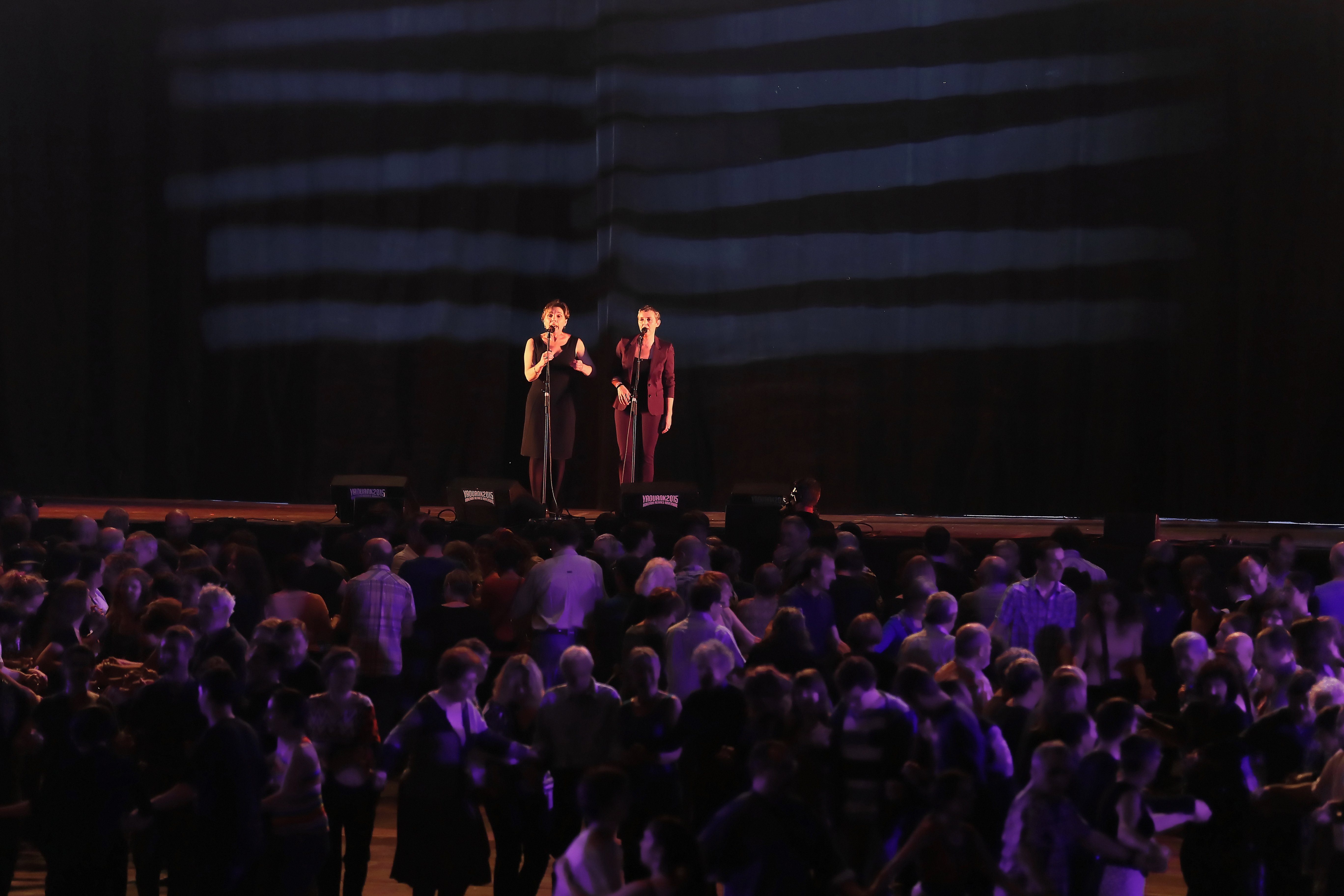 Annie Ebrel et Nolùen Le Buhé en fest-noz lors du festival Yaouank le 21 novembre 2015 au Parc des Expositions de Rennes.